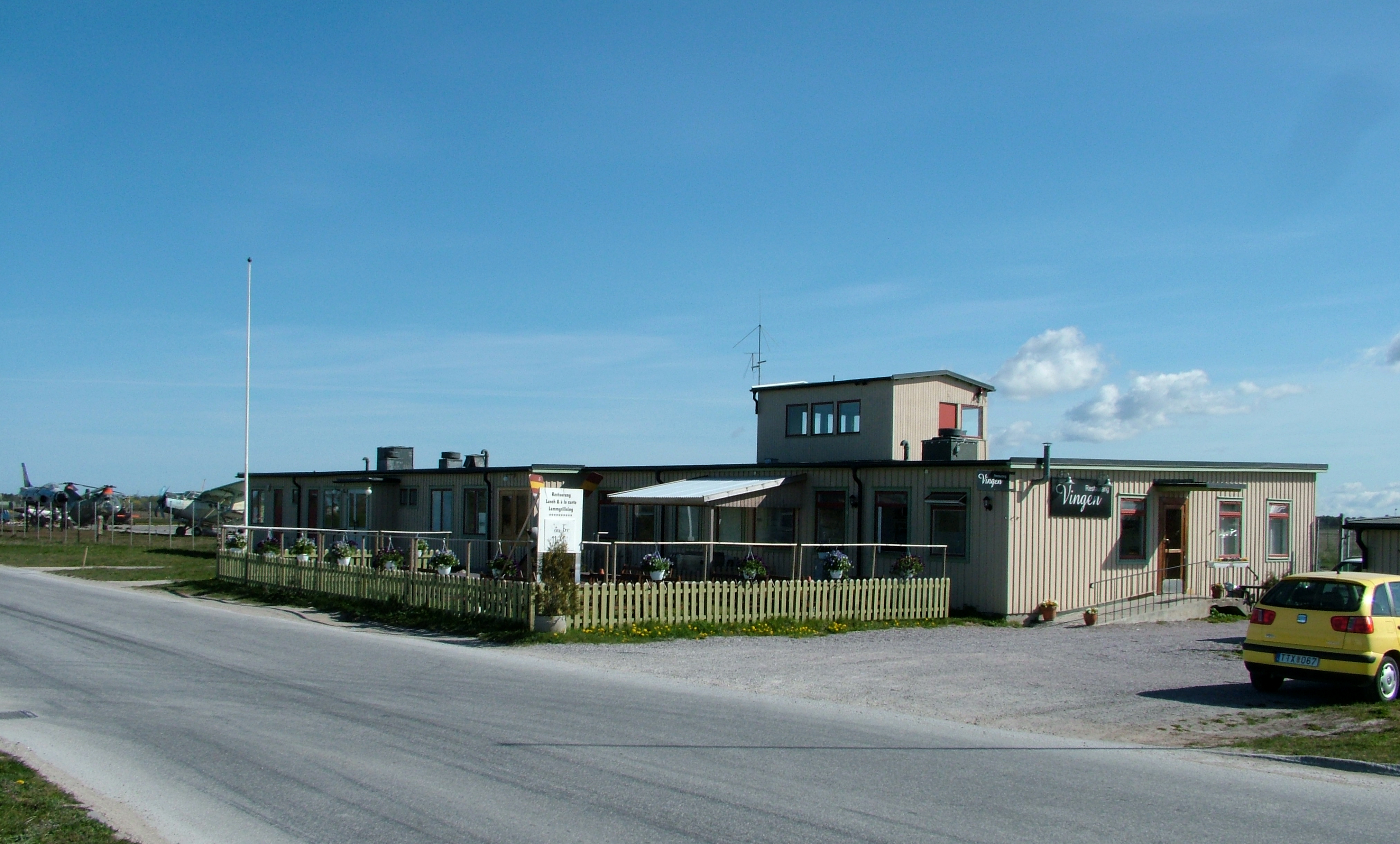 Visbys gamla flygplatsbyggnad vid flygfältet, Gotland, Visby